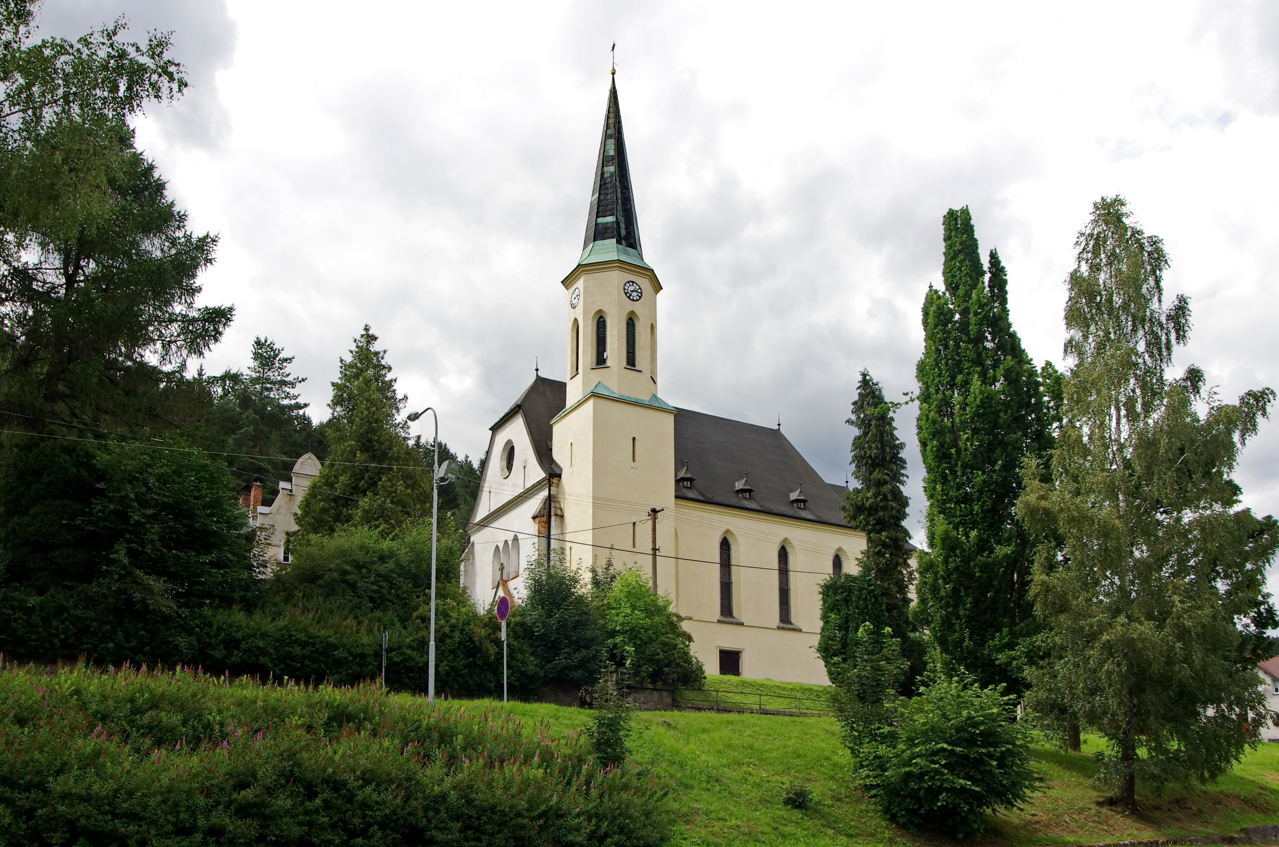 Stříbrná, okres Sokolov, kostel Nejsvětějšího Srdce Páně